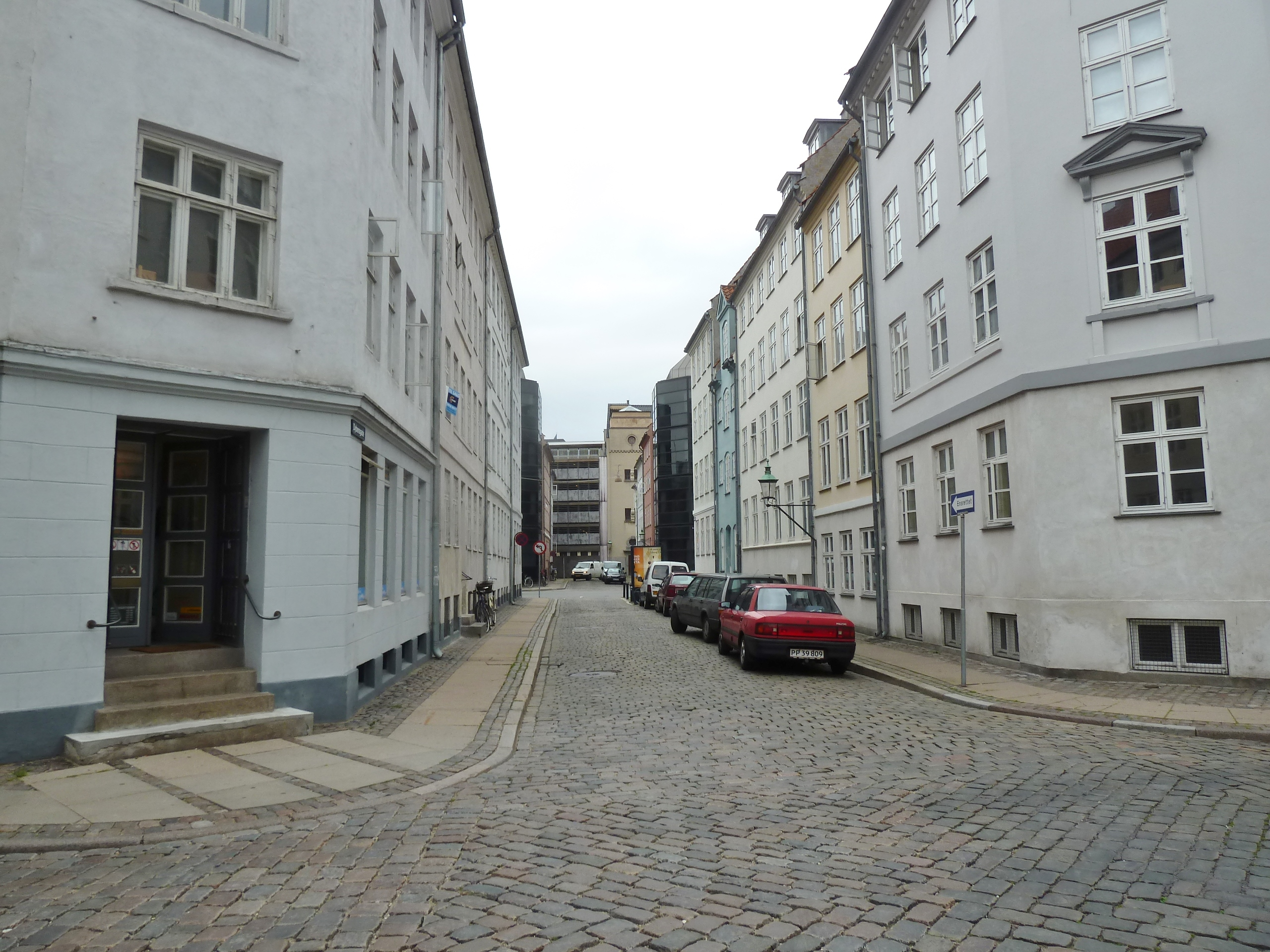 The street Dybensgade in Indre By in Copenhagen.